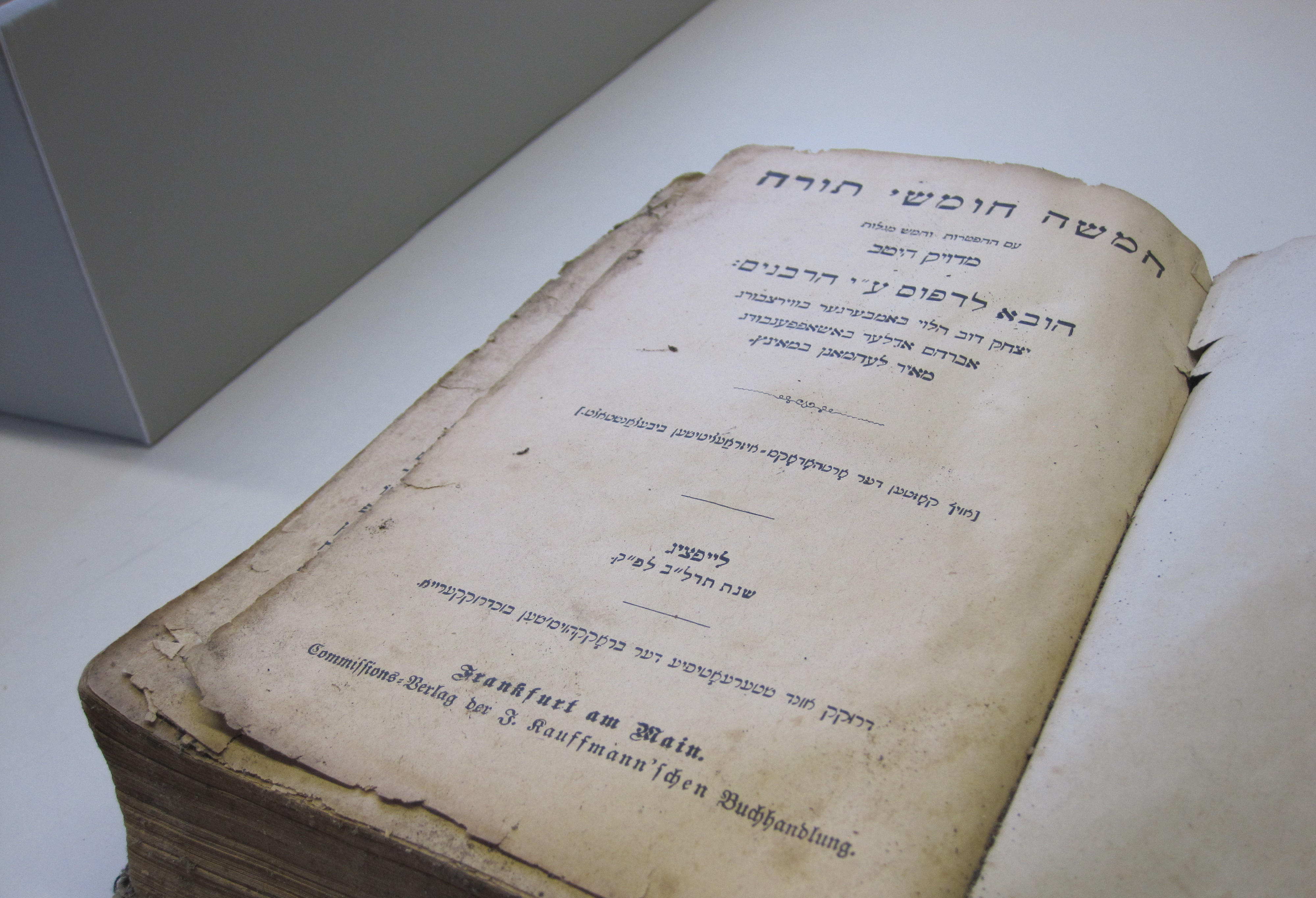 Geniza gefunden in einem Geschäftshaus in Lechenich